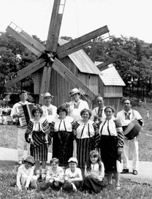 Dinauti